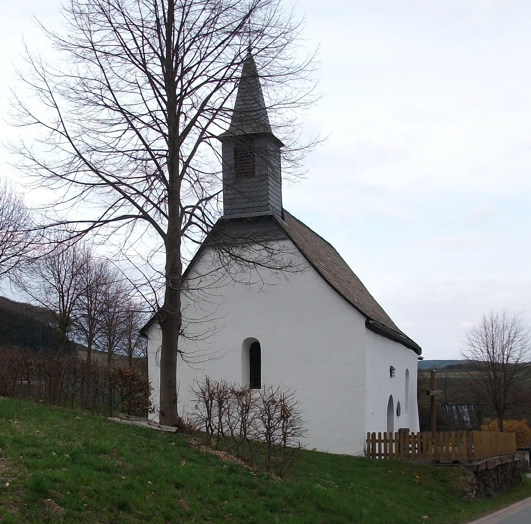 Schmallenberg-Menkhausen, denkmalgeschützte St. Agatha Kapelle, Anno 1667 (Germany)